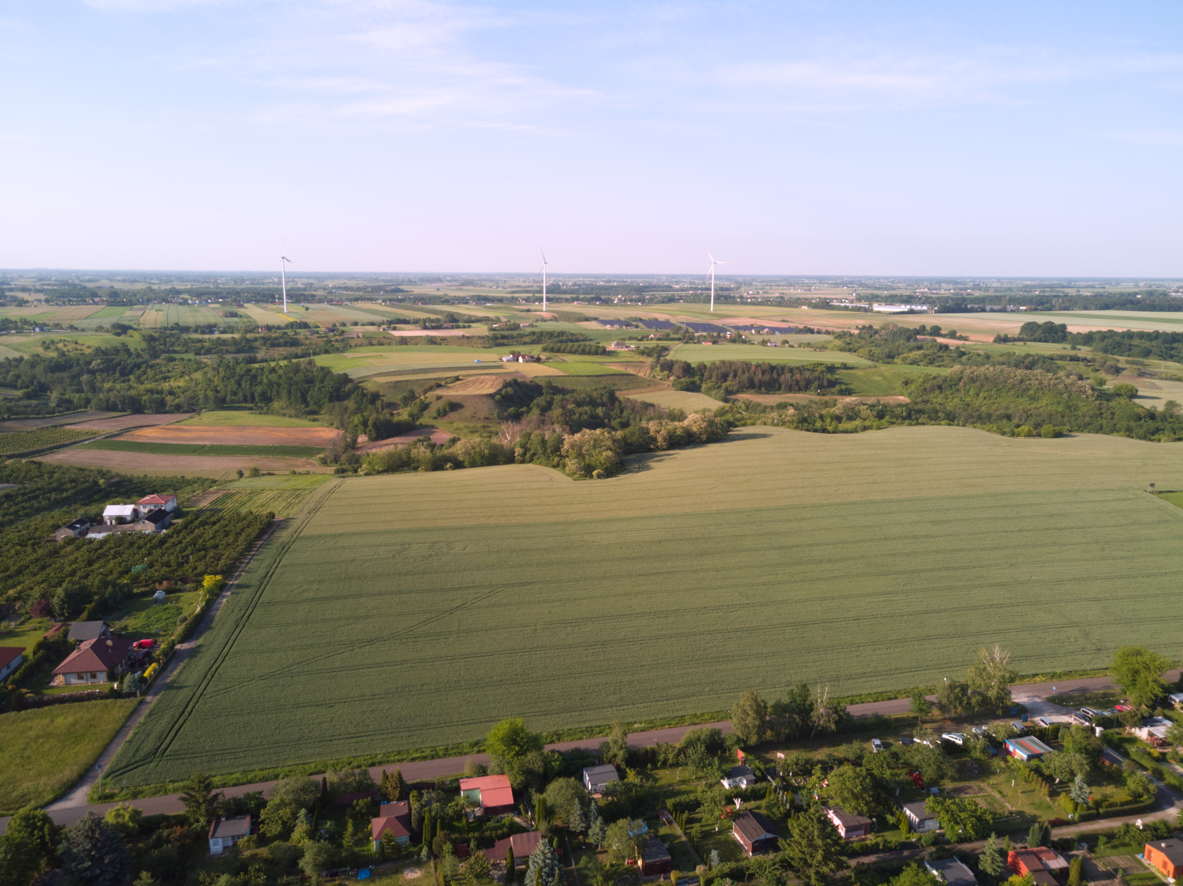 Okolice Zarzeczewa (2020 r.)